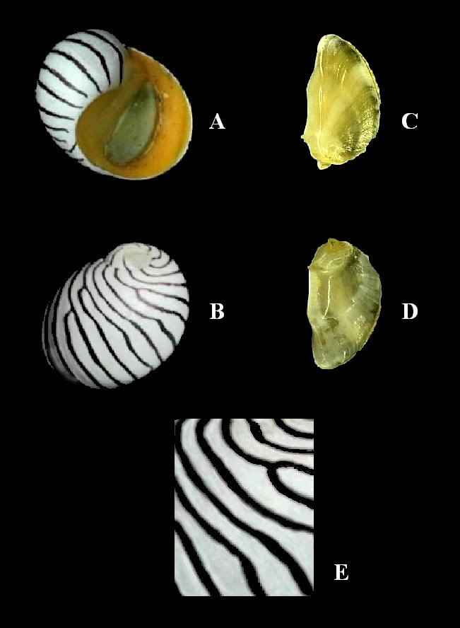 Puperita pupa, Salinas de Araya, Sucre - Venezuela